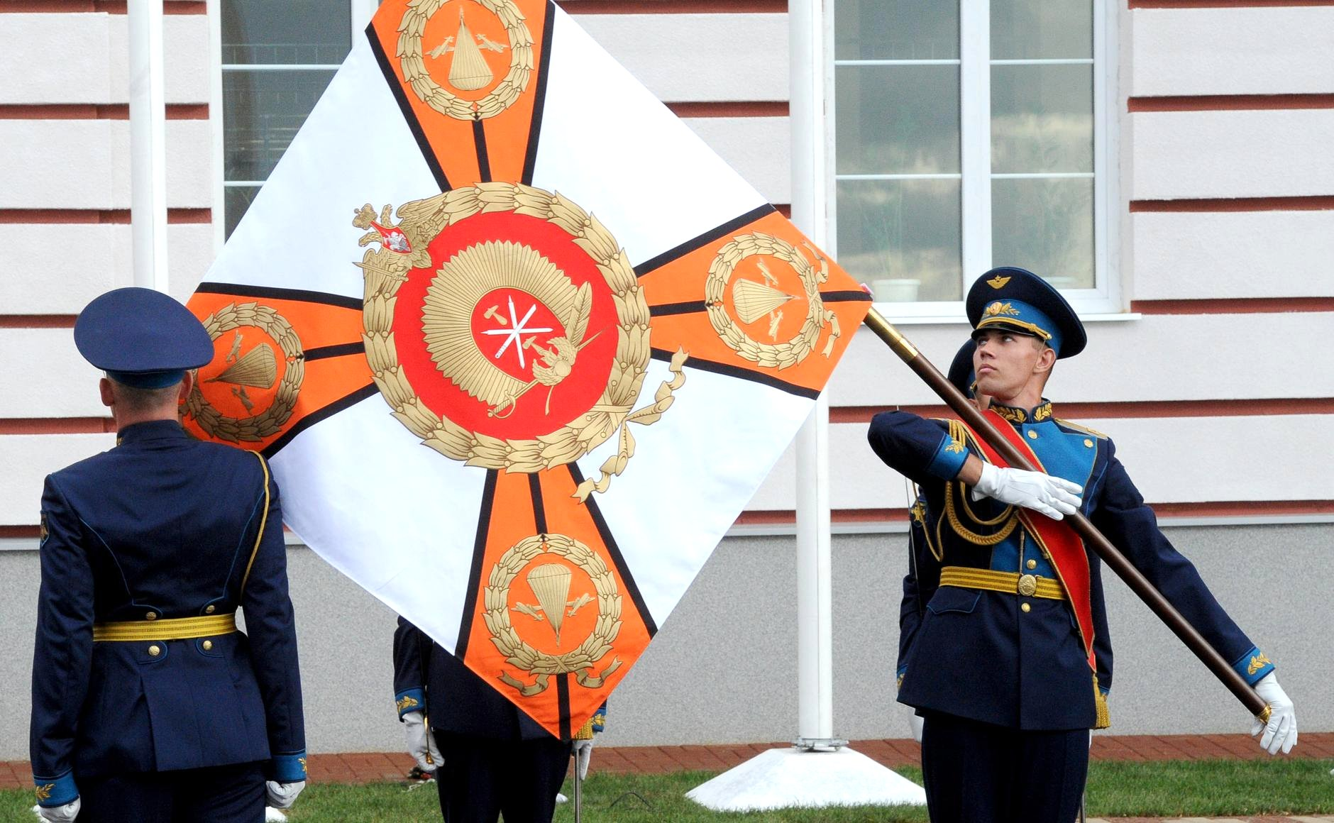 Посещение Президентом России Владимиром Путиным Тульского суворовского военного училища. Церемония вручения знамени Тульскому суворовскому военному училищу.